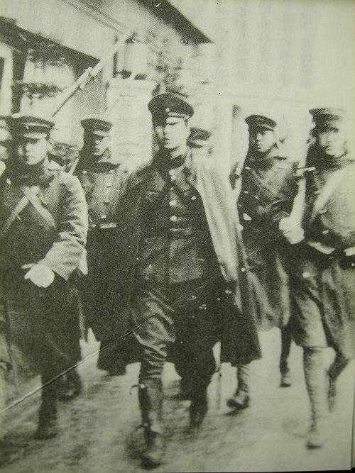 Militari ribelli durante la sommossa del 26 febbraio 1936 a Tokyo